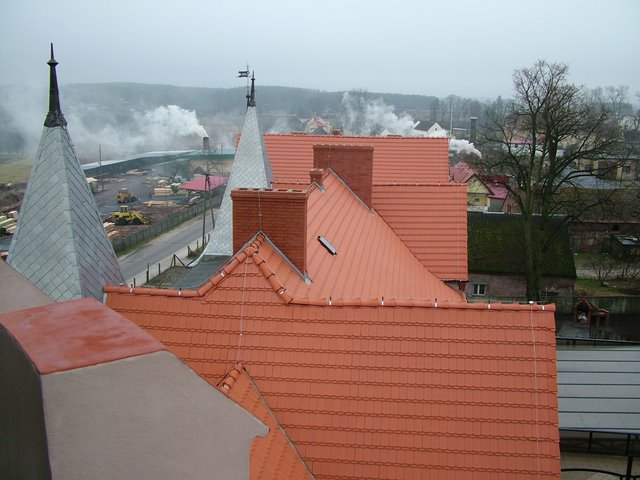 Widok z wieży zachodniej